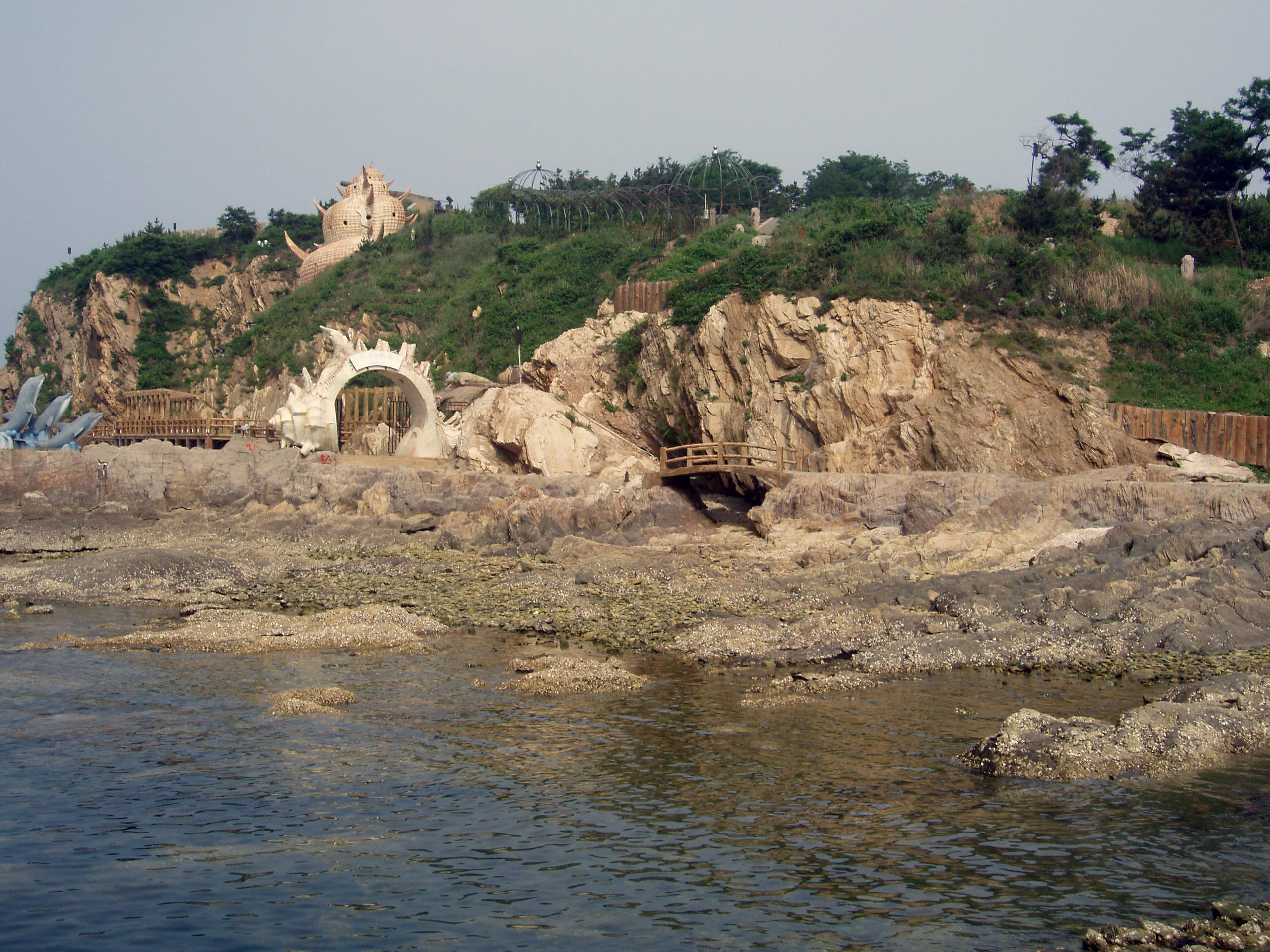 Moon Bay (月亮湾) of (Yantai), Shandong, China